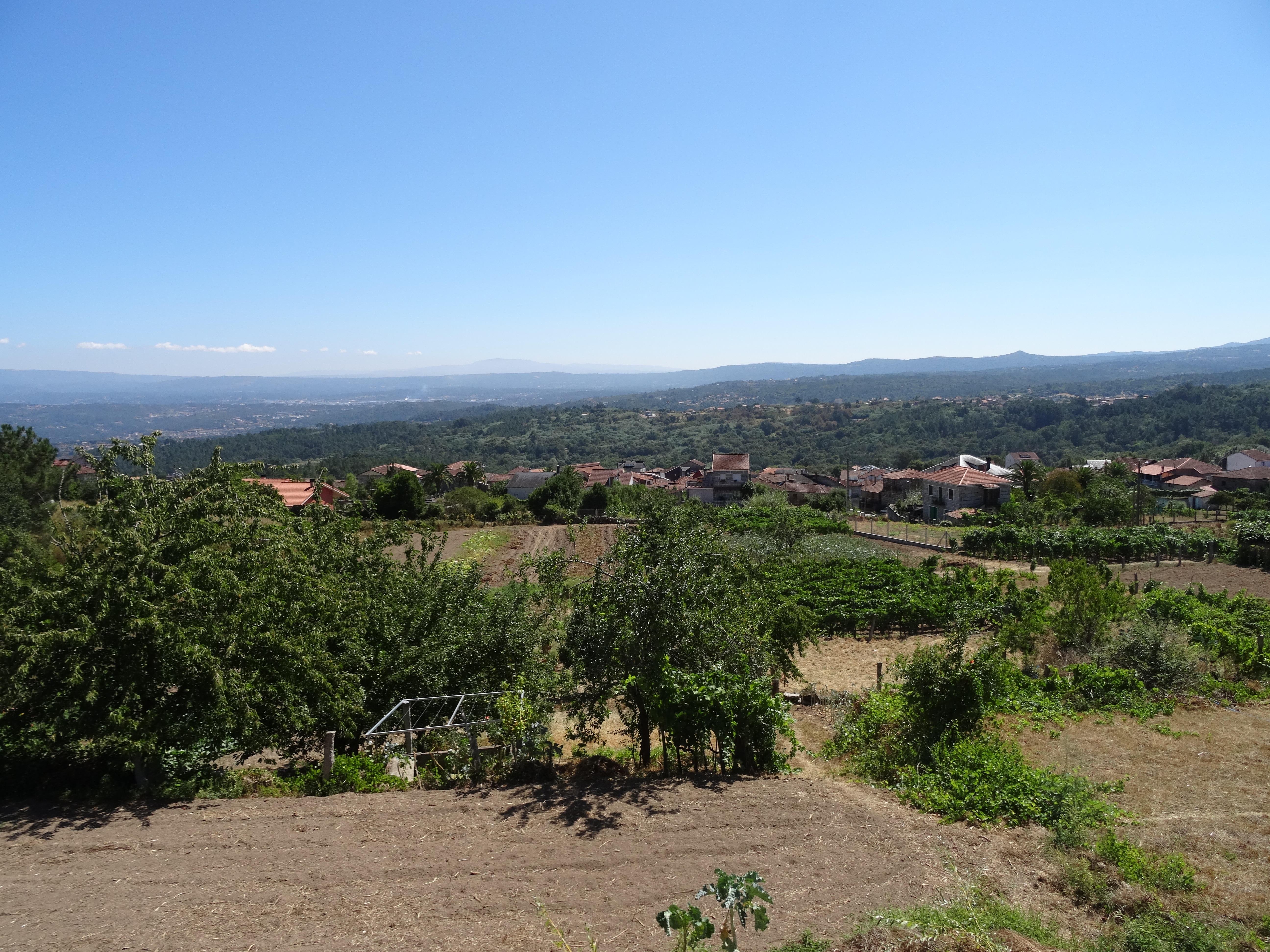 Ver título.